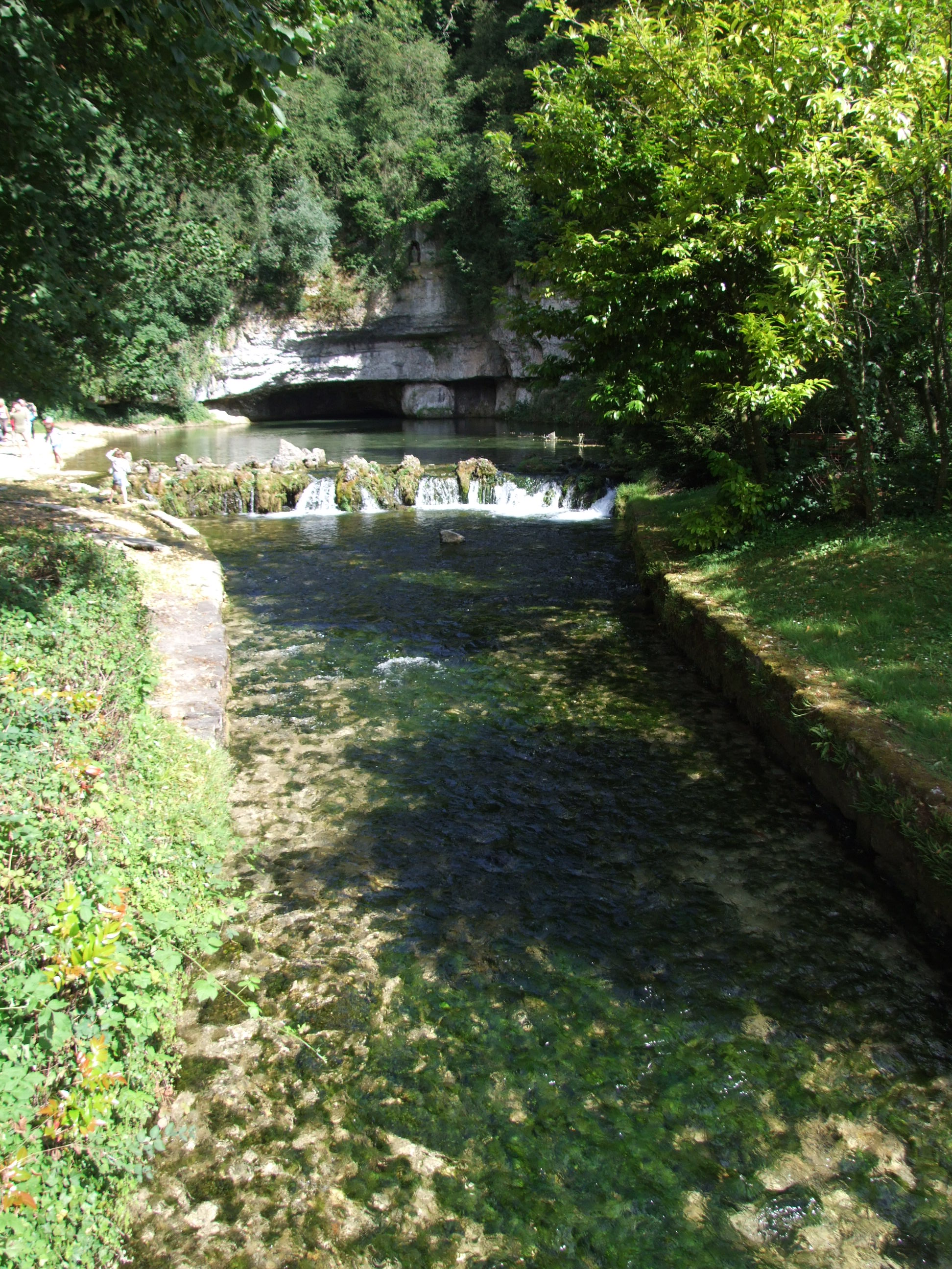 Source de la Douix, Châtillon-sur-Seine, Côte-d'Or, Bourgogne, FRANCE